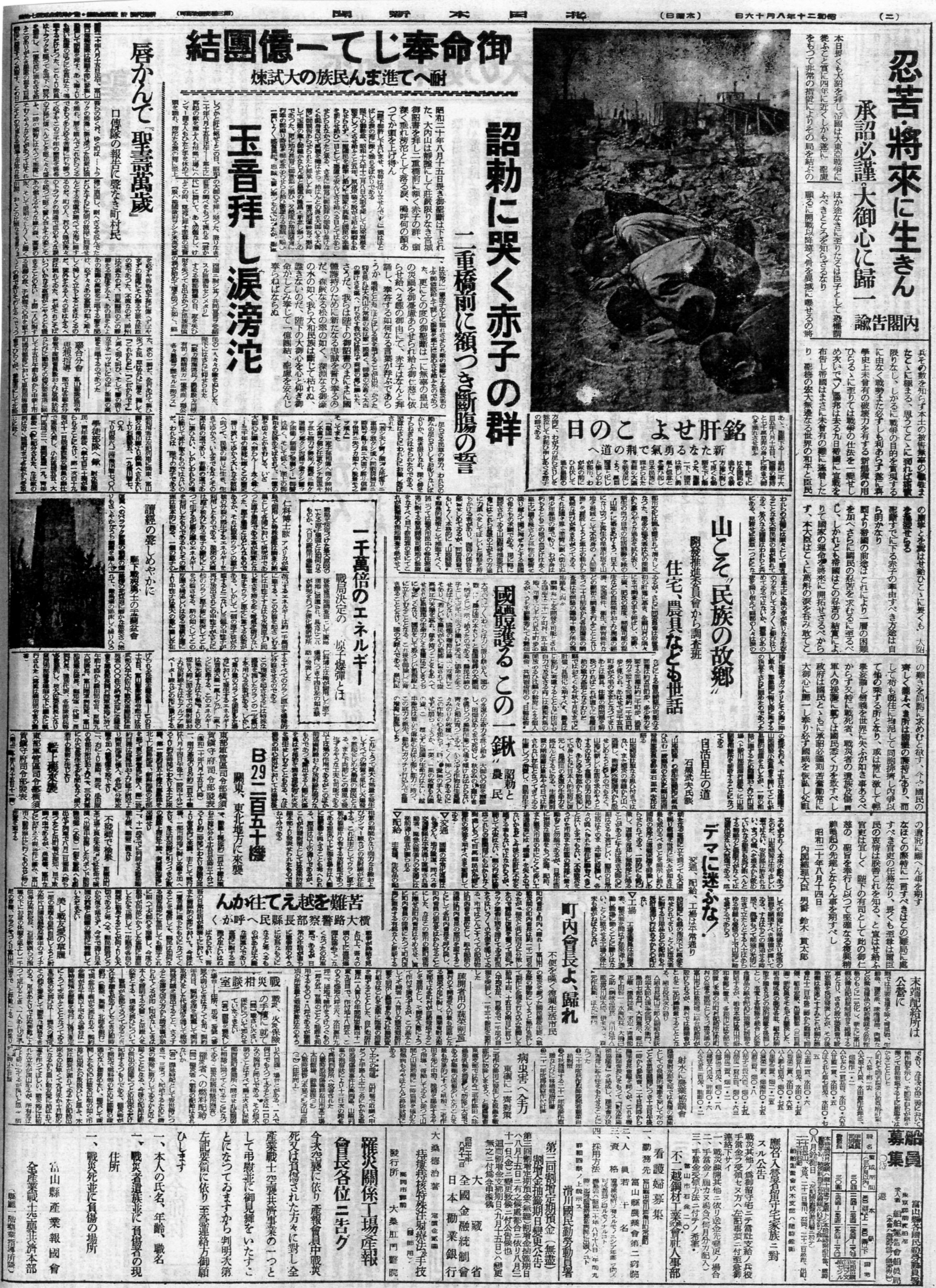 玉音放送を拝する国民